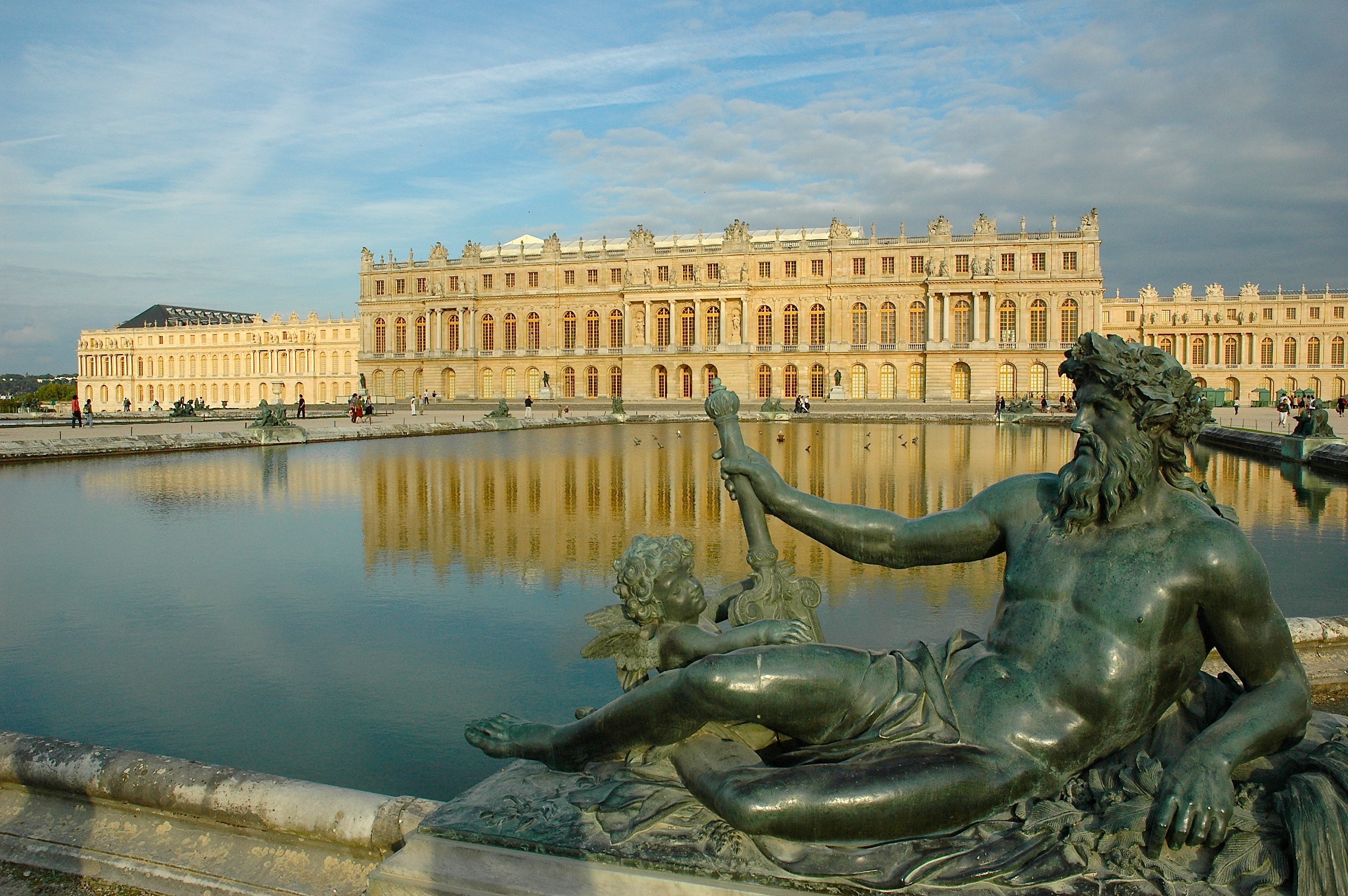 Vue du château de Versailles depuis le parc